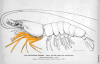 pattes locomotrices